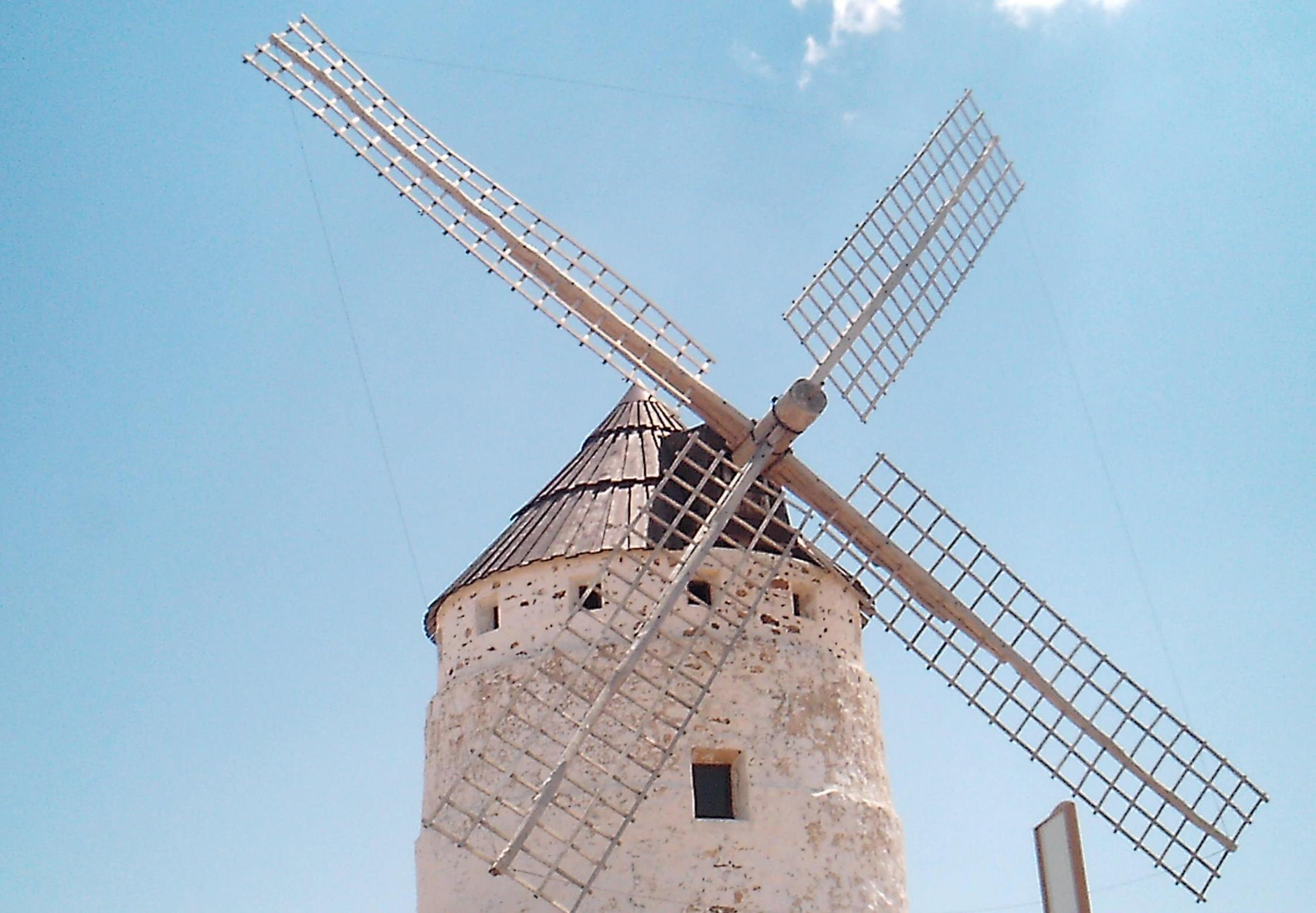 Imagen del Molino de Viento de Ojos Negros (Parte Delantera).